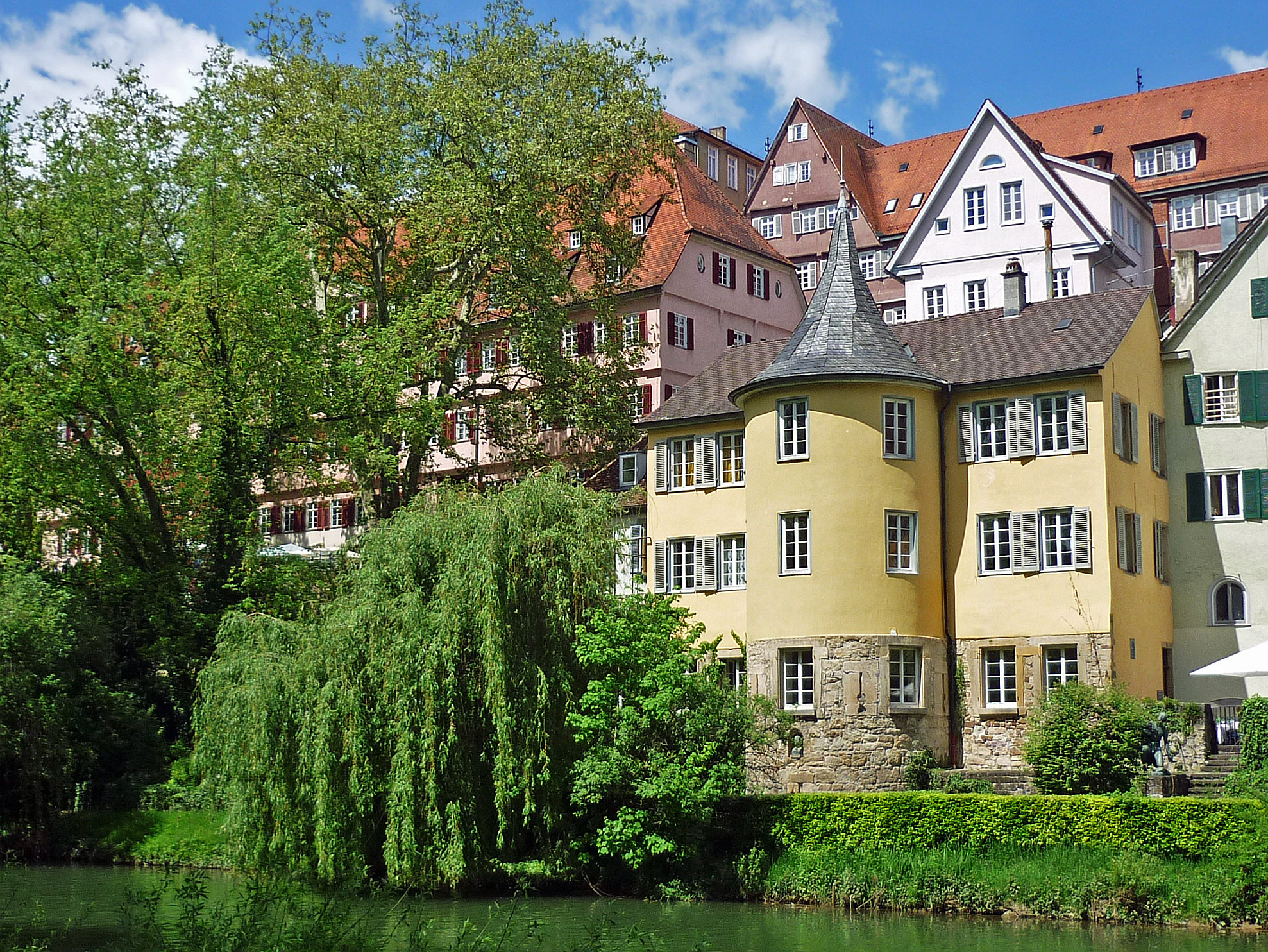 Hölderlinturm am Neckarufer in Tübingen (Württemberg)